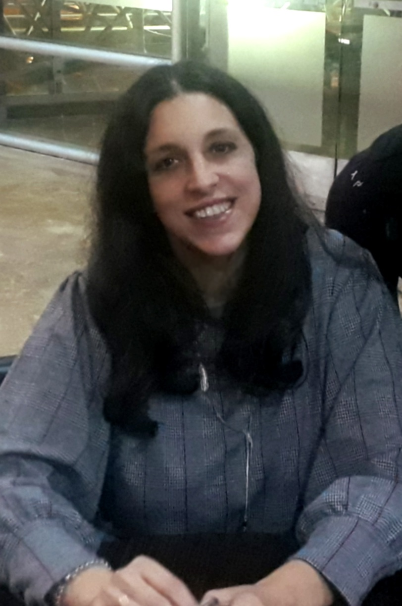 Ariana Harwicz en la Feria Internacional del Libro de Guayaquil 2018